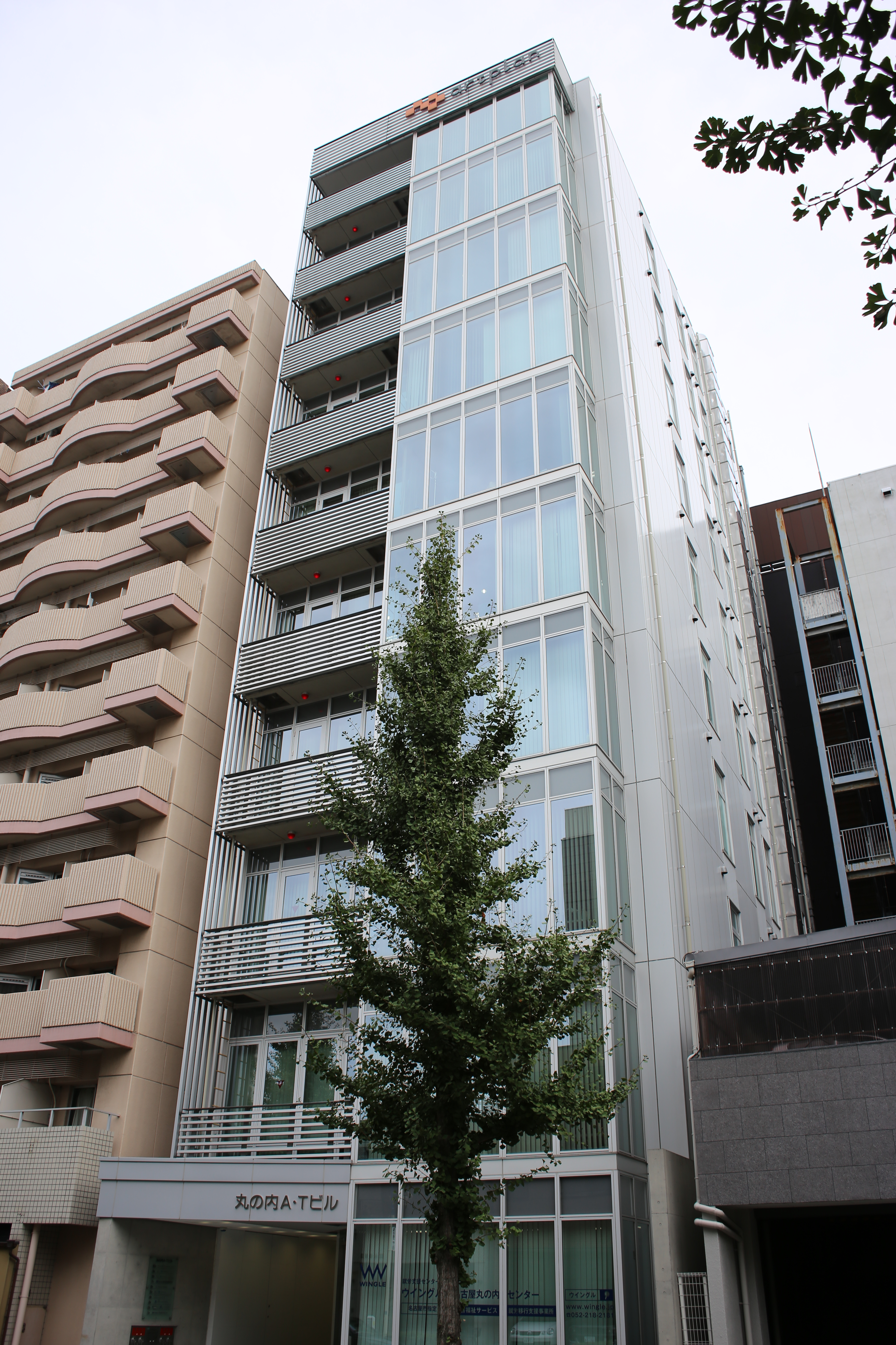 名古屋市中区丸の内二丁目の丸の内ATビルを北側公道西側より撮影